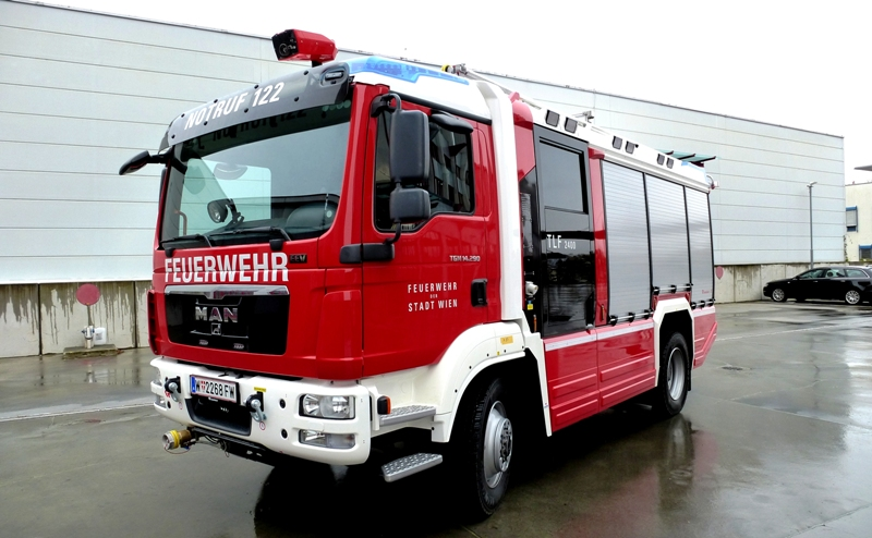 Tanklöschfahrzeug der Berufsfeuerwehr Wien